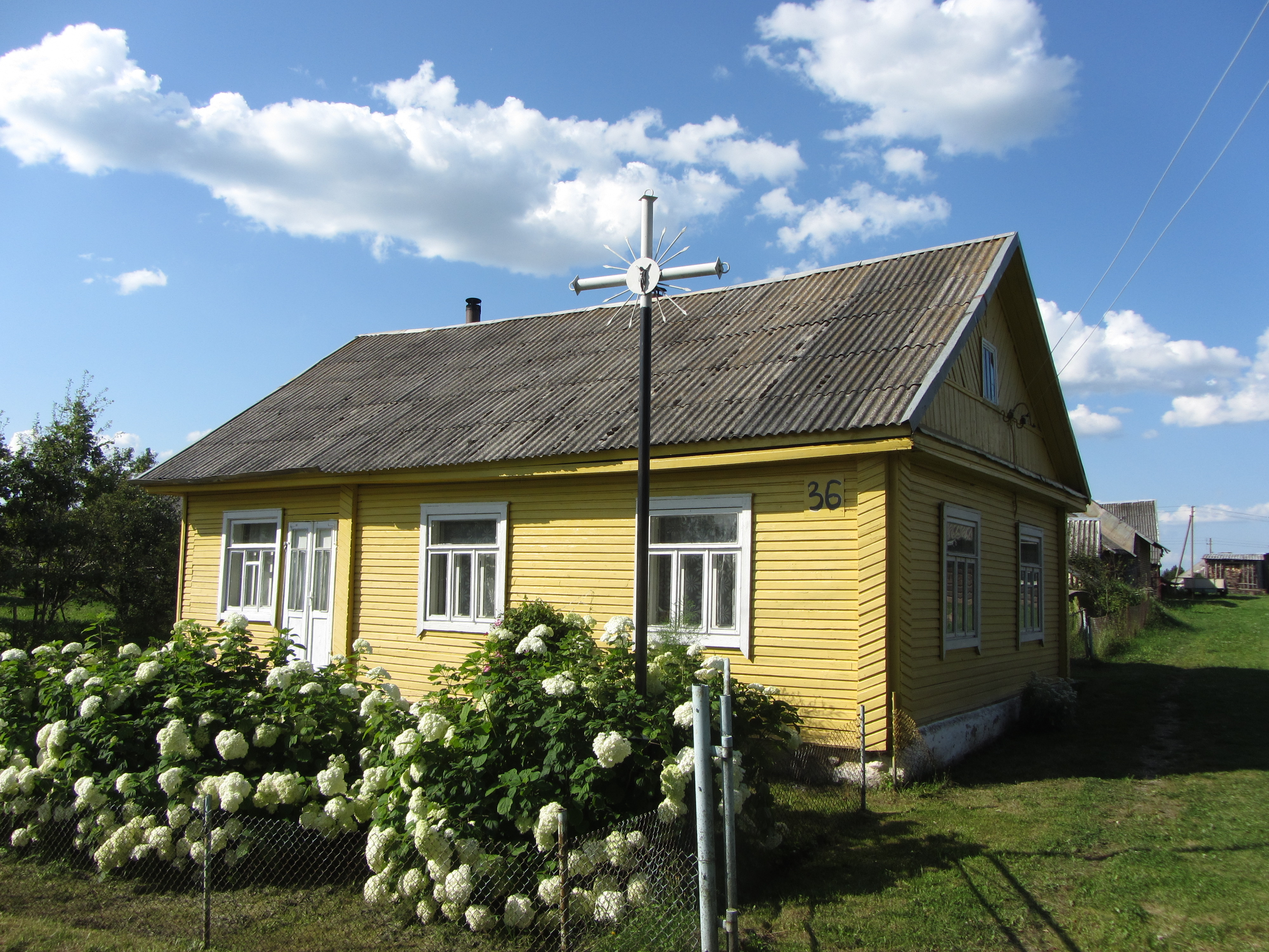 Didžiasalis, Lithuania